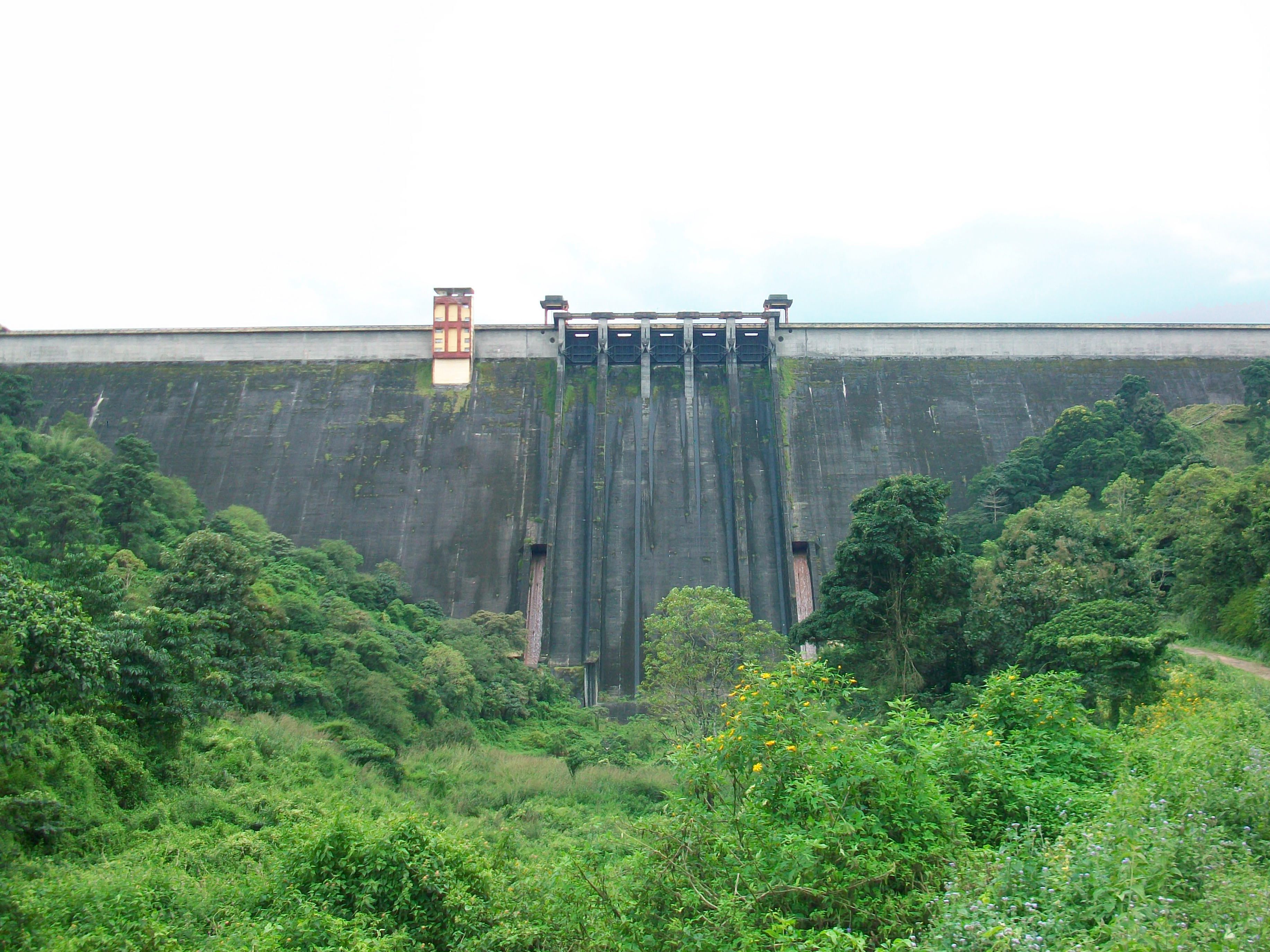 ചെറുതോണി അണക്കെട്ട്